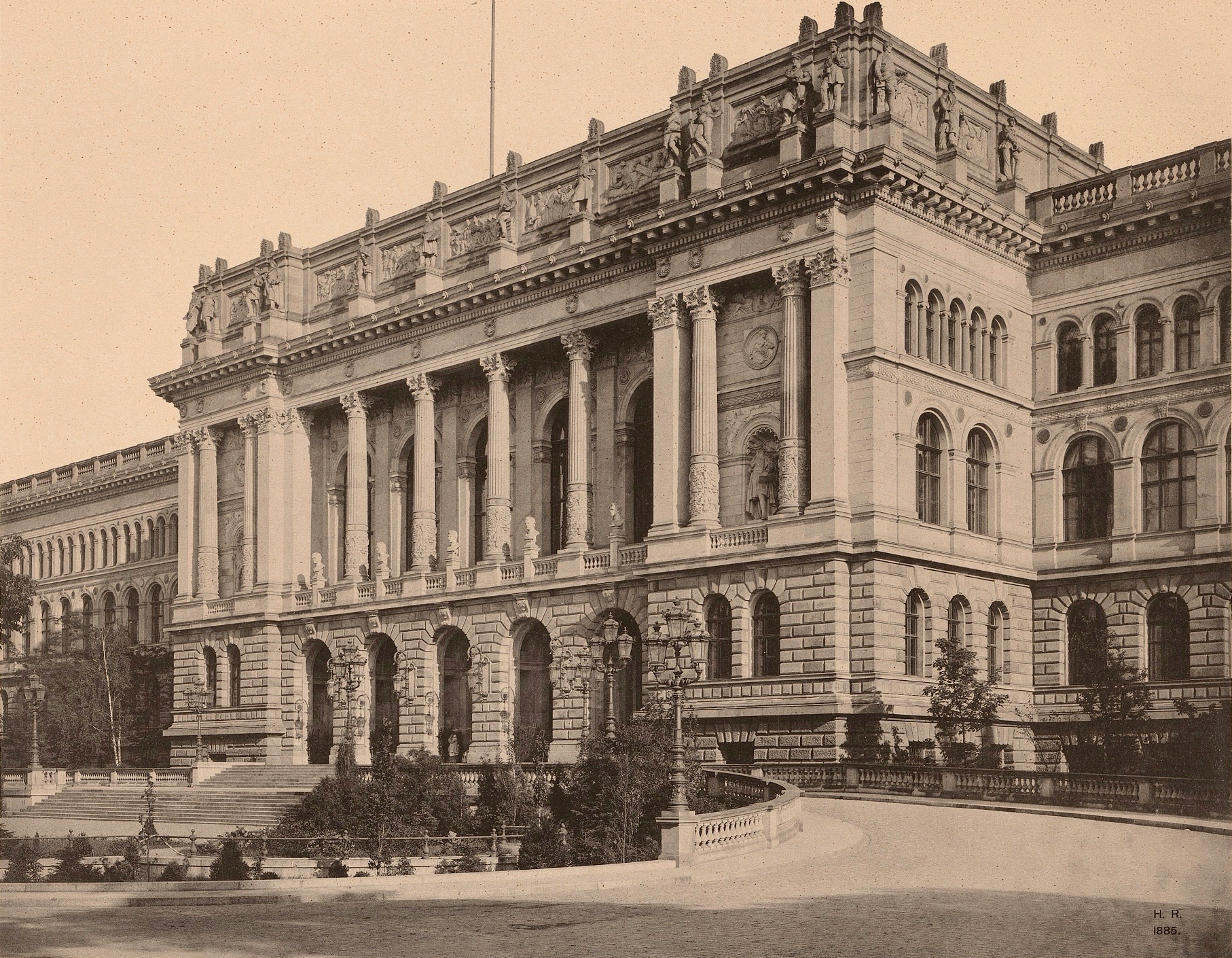 TU Berlin Hauptgebäude Vorderseite